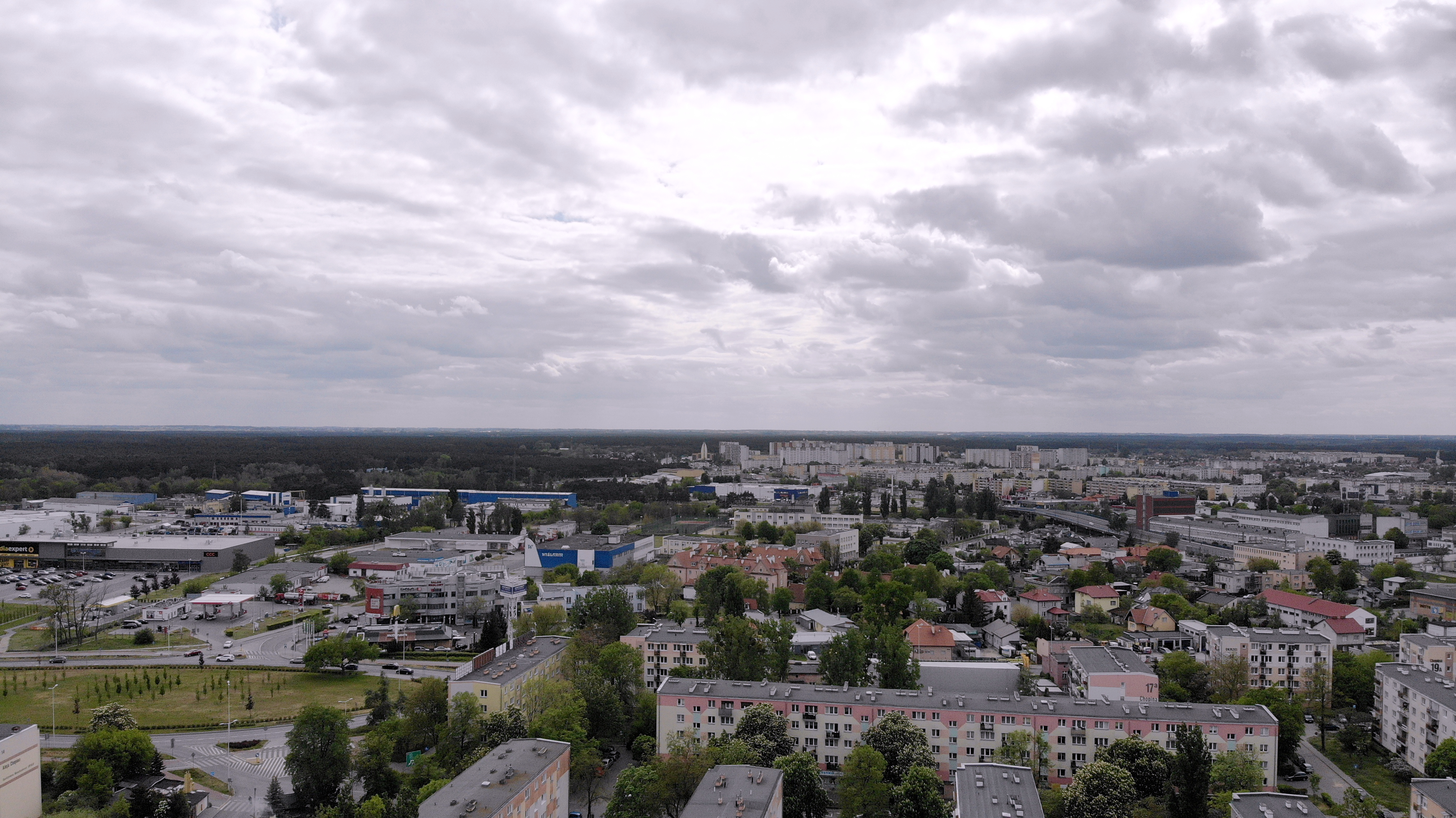 Styk Śródmieścia, Południa i Kaziemiarza Wielkiego